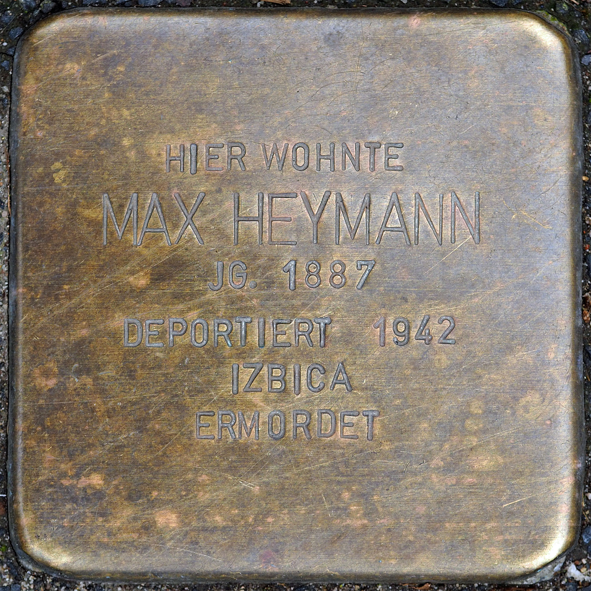 Stolpersteine MG: Heymann, Max